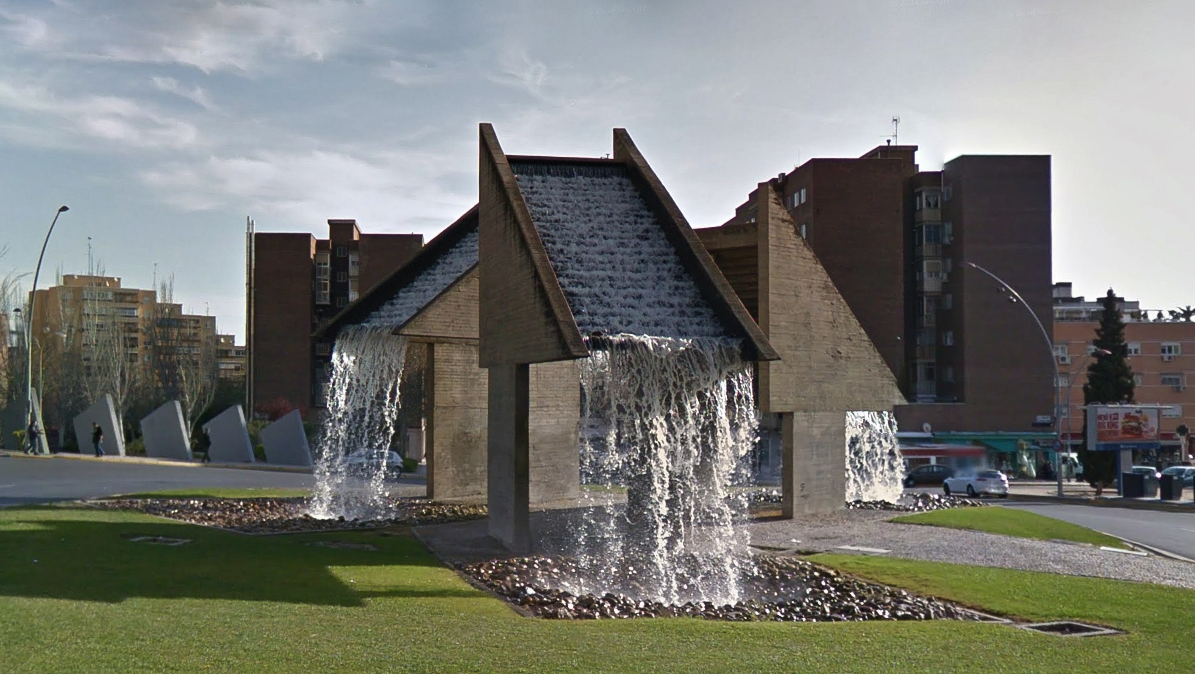 Fuente de las Escaleras en Fuenlabrada, Madrid, España